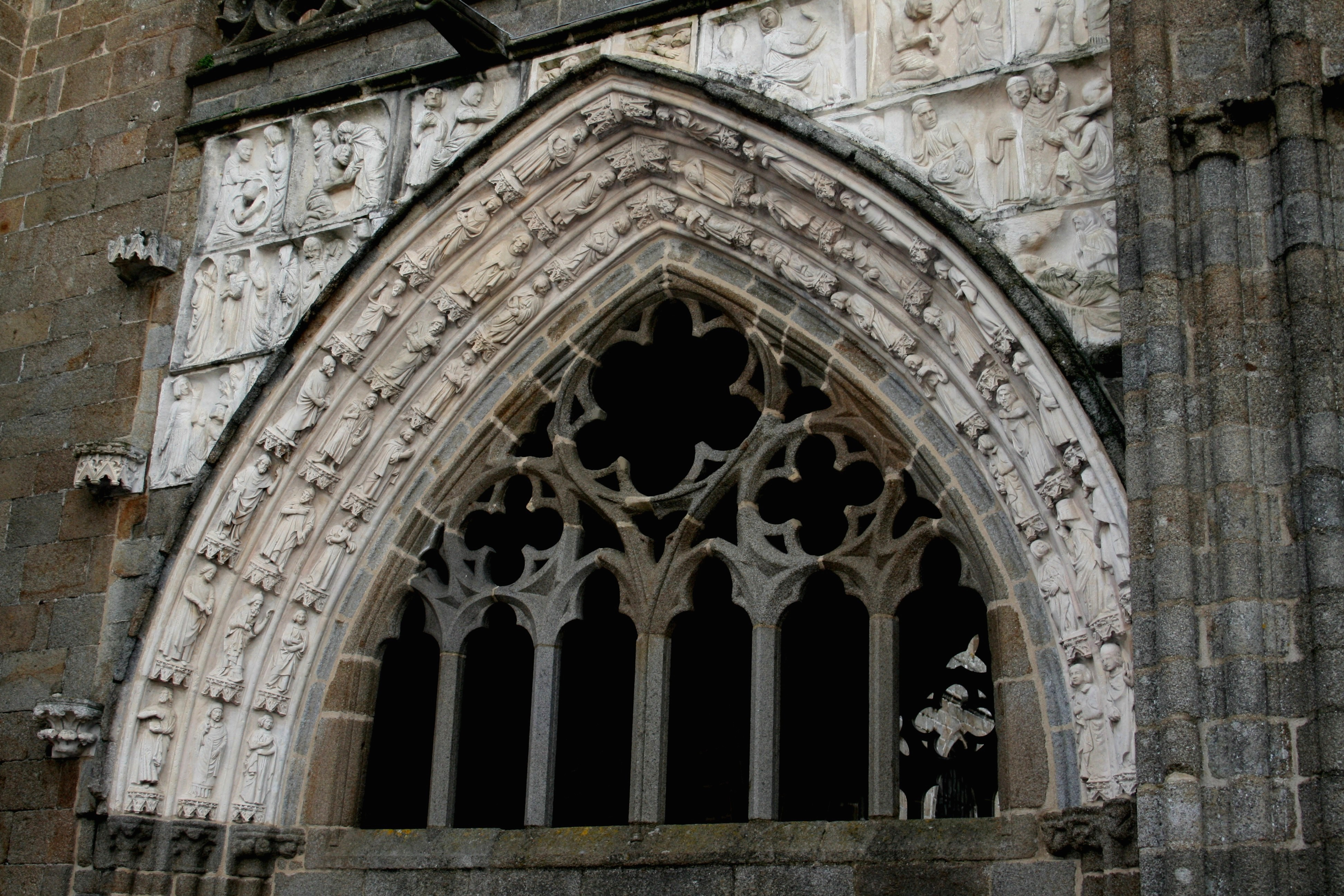 Grand porche ( face ouest) de la cathédrale Saint-Samson de Dol-de-Bretagne, France, 14e s.